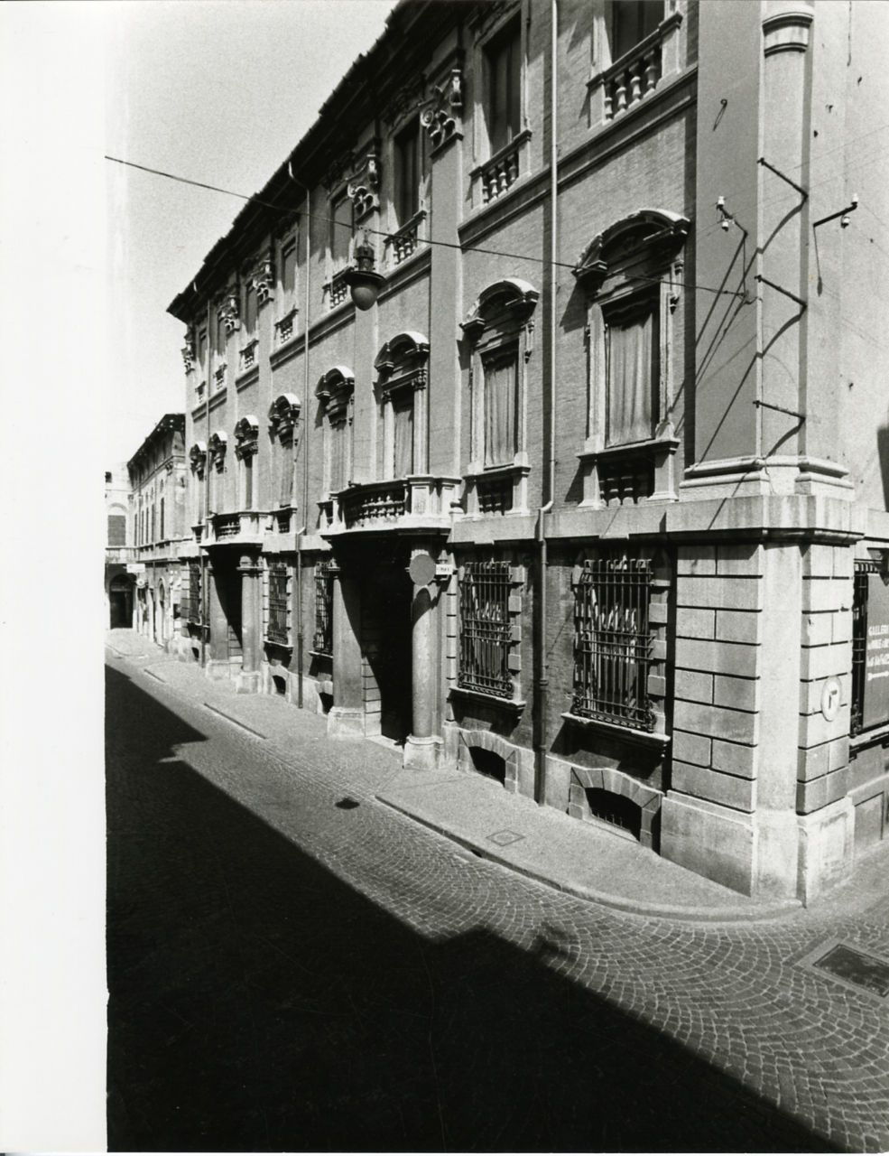 Forlì. Centro storico: palazzi. Servizio fotografico : Forlì, 1971 / Paolo Monti, Istituto di fotografia Paolo Monti. - Stampe: 3 : Positivo b/n, gelatina bromuro d'argento/ carta, 24x30. - ((Al verso delle stampe manoscritti i numeri dei negativi corrispondenti: 1747/4, 1747/8, 1748/45. Sul coperchio della scatola, manoscritto a pennarello: "Emilia. Centri Storici. Forlì". - Occasione: Campagna di rilevamento del centro storico. - Fonte: Fattura di Paolo Monti: IV. Commesse/ Fattura/ Rilevamento fotografico del centro storico di Forlì (1971/10/18), presso Archivio Paolo Monti. N. 525 riprese fotografiche stampate in formato 24x30; n. 236 diapositive a colori Ektachrome formato 35mm